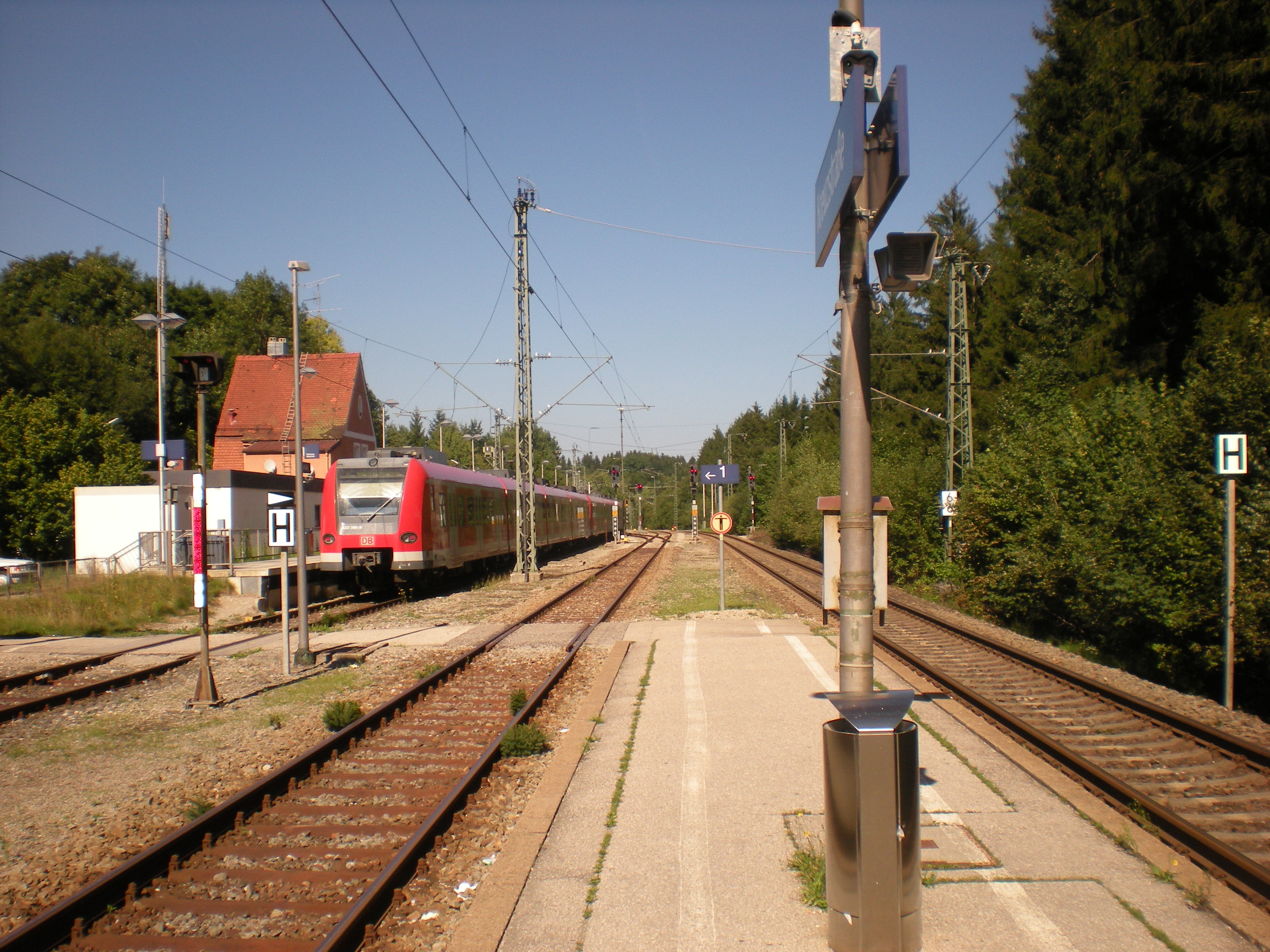 Bahnsteige des Bahnhofs Kreuzstraße, im Vordergrund der Mittelbahnsteig der Mangfalltalbahn, im Hintergrund der Hausbahnsteig der S-Bahn mit S7 nach Wolfratshausen